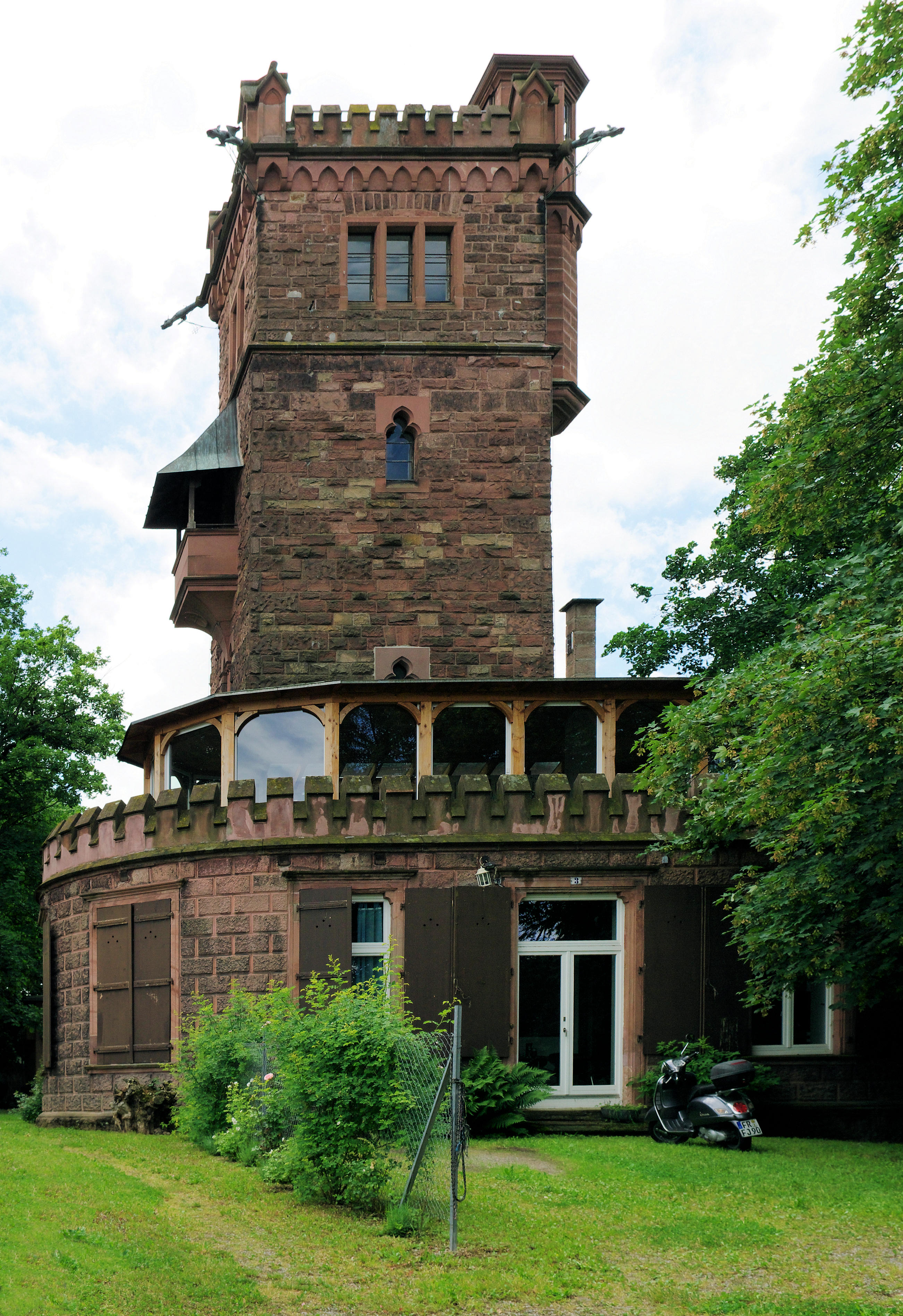 Aussichtsturm auf dem Lorettoberg zu Ehren Hilda von Nassau